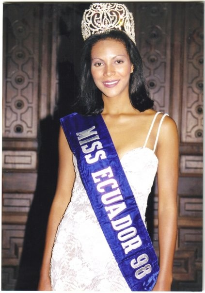 Miss Ecuador 1998 Soraya Hogonaga Serrano